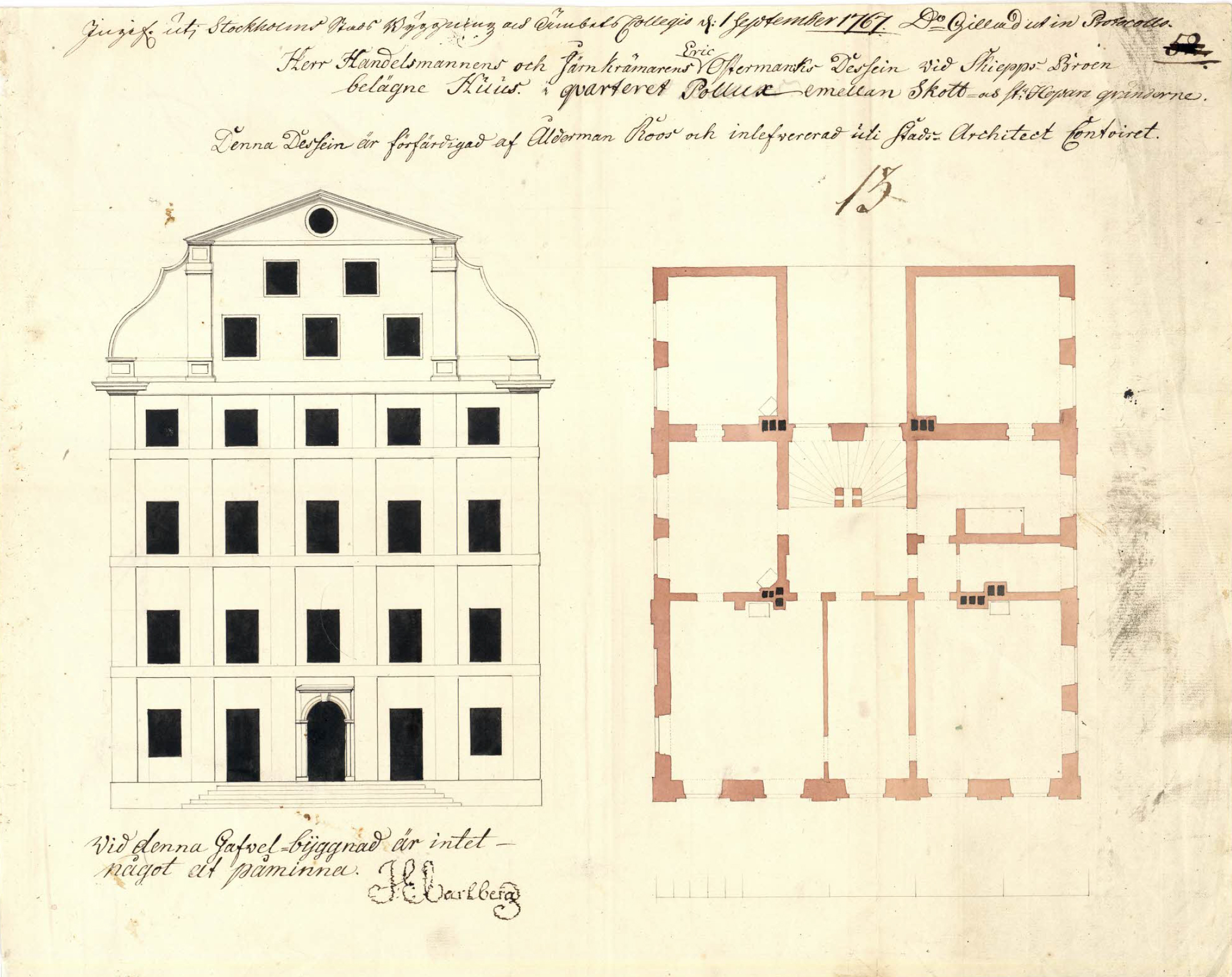 Hobelinska huset, Skeppsbron, Stockholm, fasadritning